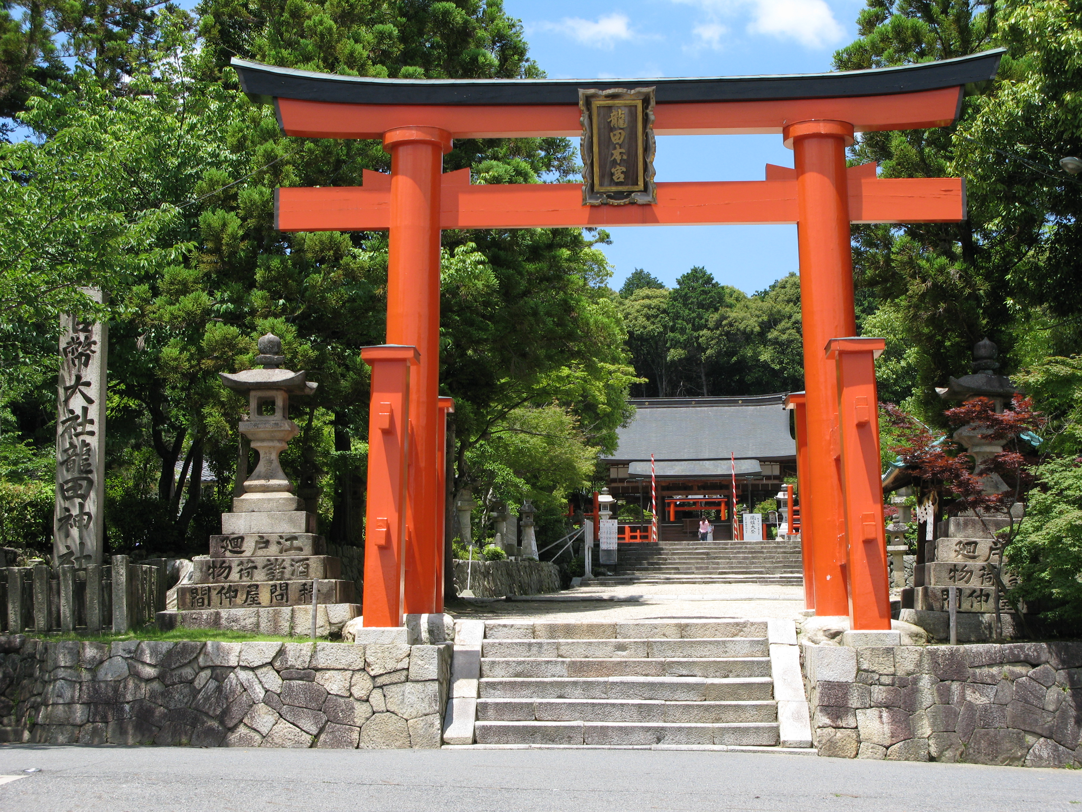 Tatsuta Shrine in Sango, Nara, Japan